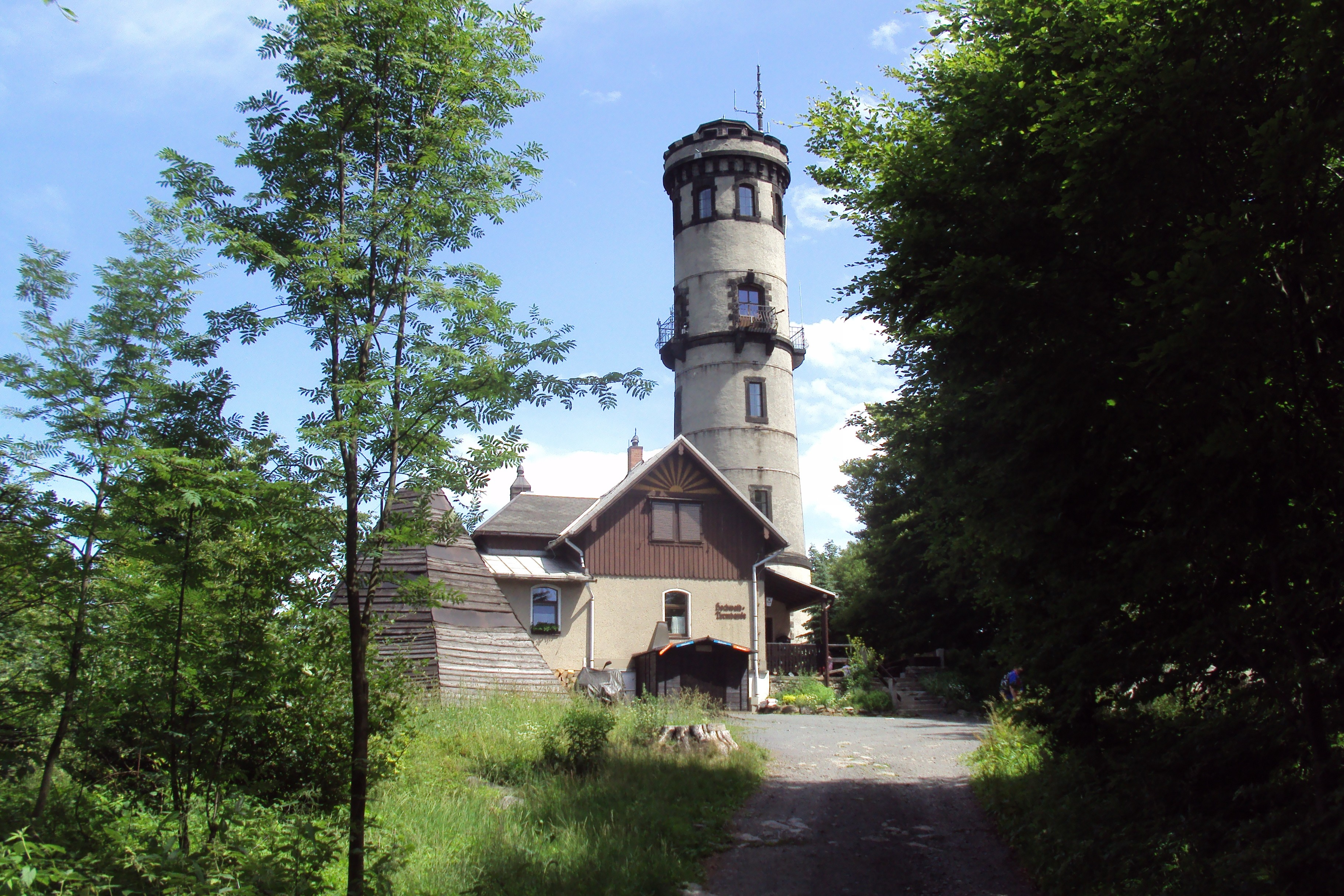 Rozhledna na Hvozdu na německé straně hory